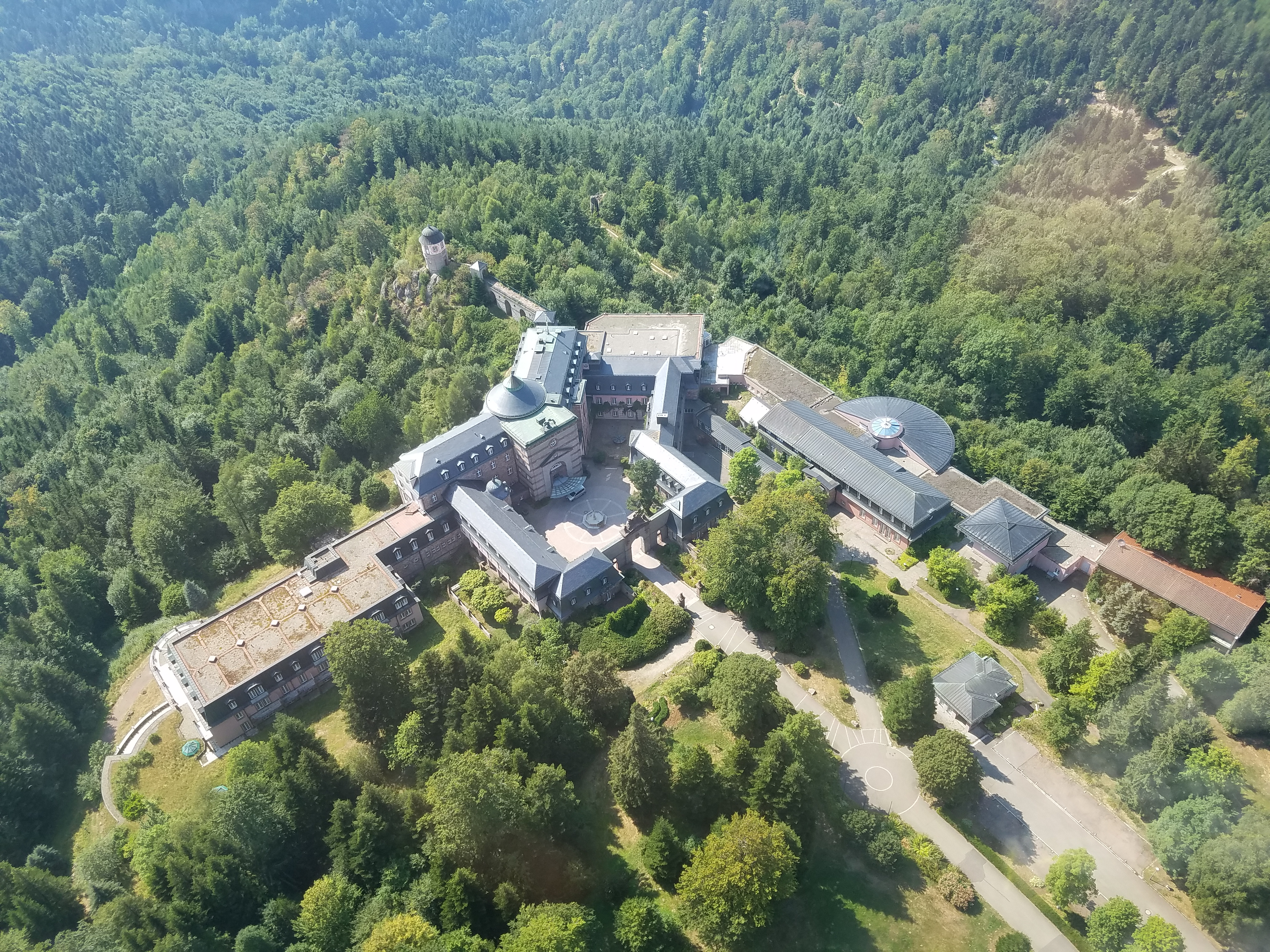 Schlosshotel Bühlerhöhe, fotografiert aus einem Helikopter